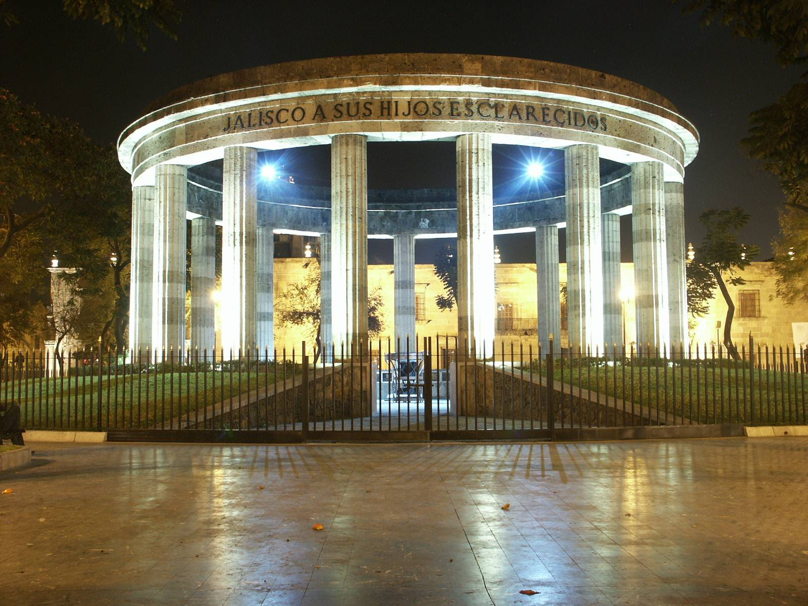 Rotonda de los Jaliscienses Ilustres — en el centro de la ciudad de Guadalajara, en México. Foto nocturna tomada con cámara digital Minolta Dimage 7 y tripié.